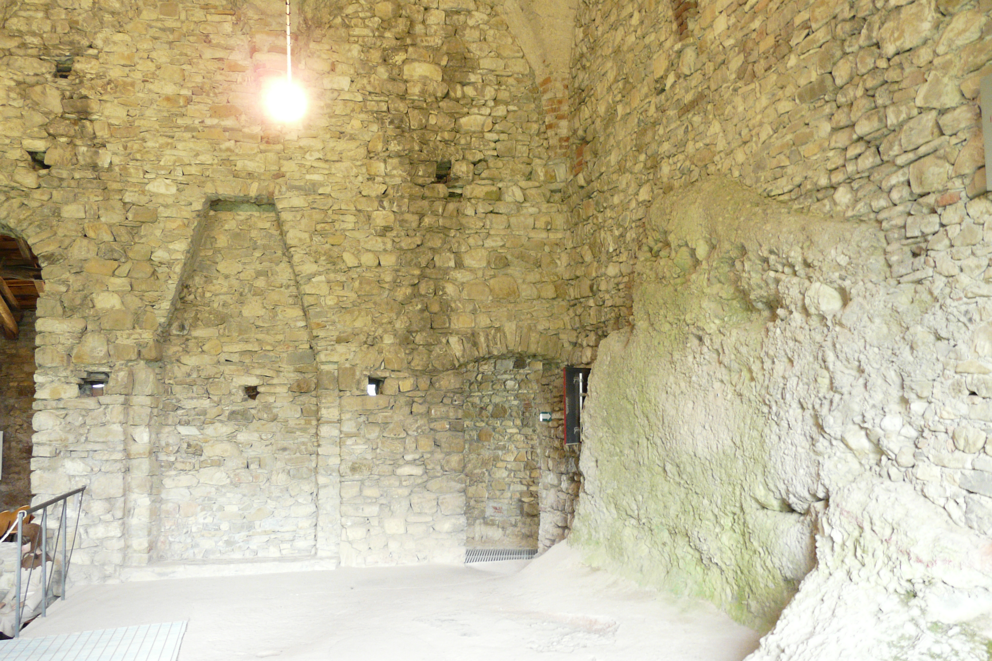 Serie di immagini interne ed esterne del Castello della Pietra di Vobbia, Liguria, Italia